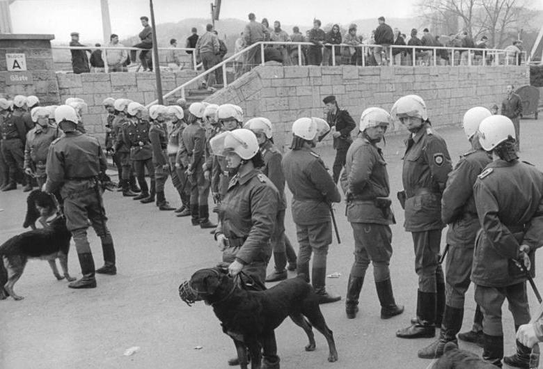 ADN-Kasper-7.4.90-Jena: Fußball-Oberliga- 20. Spieltag Ein großes Aufgebot an Bereitschaftspolizei während des Spieles FC Carl Zeiss Jena gegen FC Berlin, Ergebnis 1:1, war offenbar immer noch nicht ausreichend, um sogenannte Fans aus der Hauptstadt einzuschüchtern. Es kam zu Ausschreitungen, die wohl nicht nur den Freunden des runden Leders eine Gänsehaut über den Rücken jagen